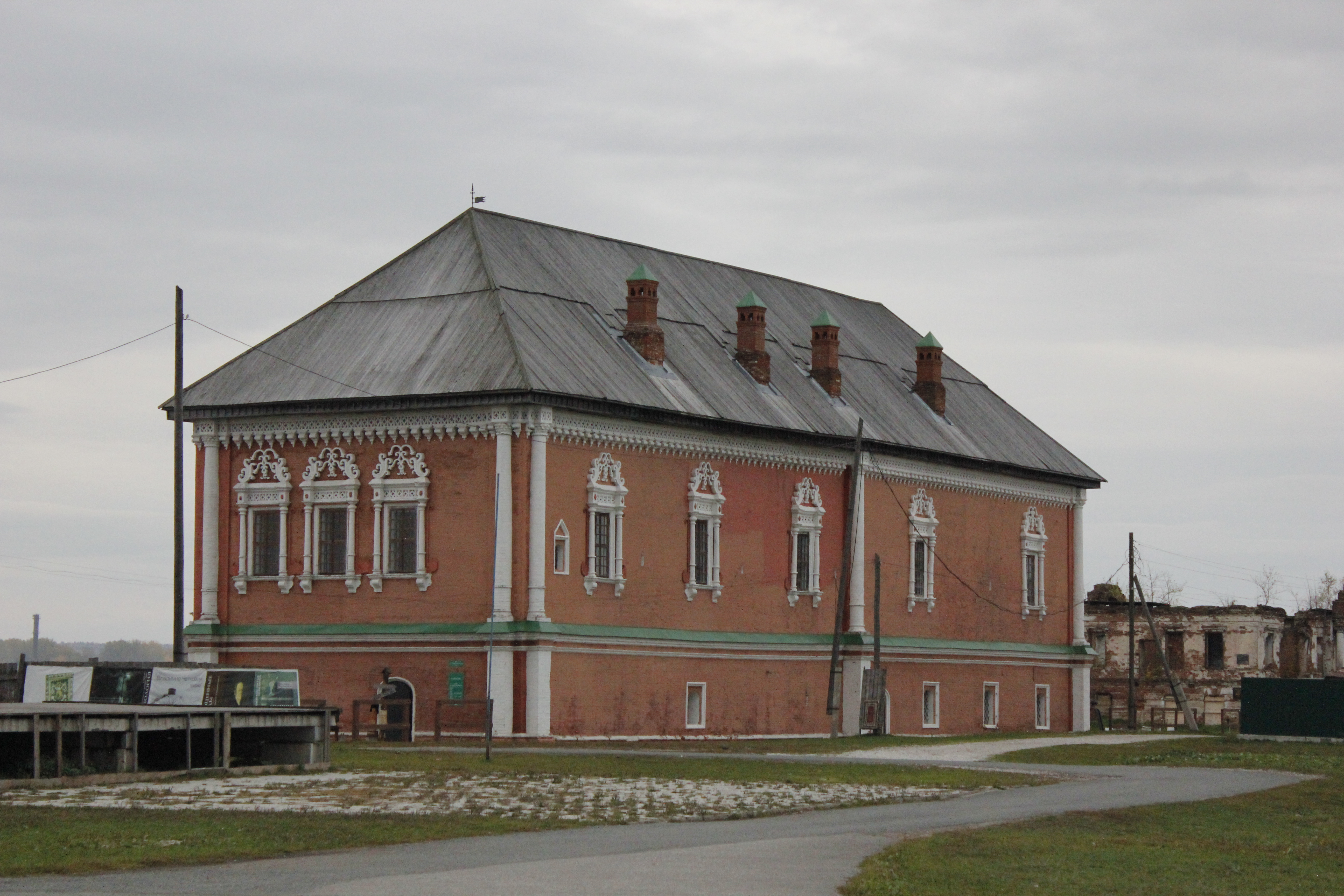 Главный дом (Пермский край, Усолье, республиканская улица, 29)